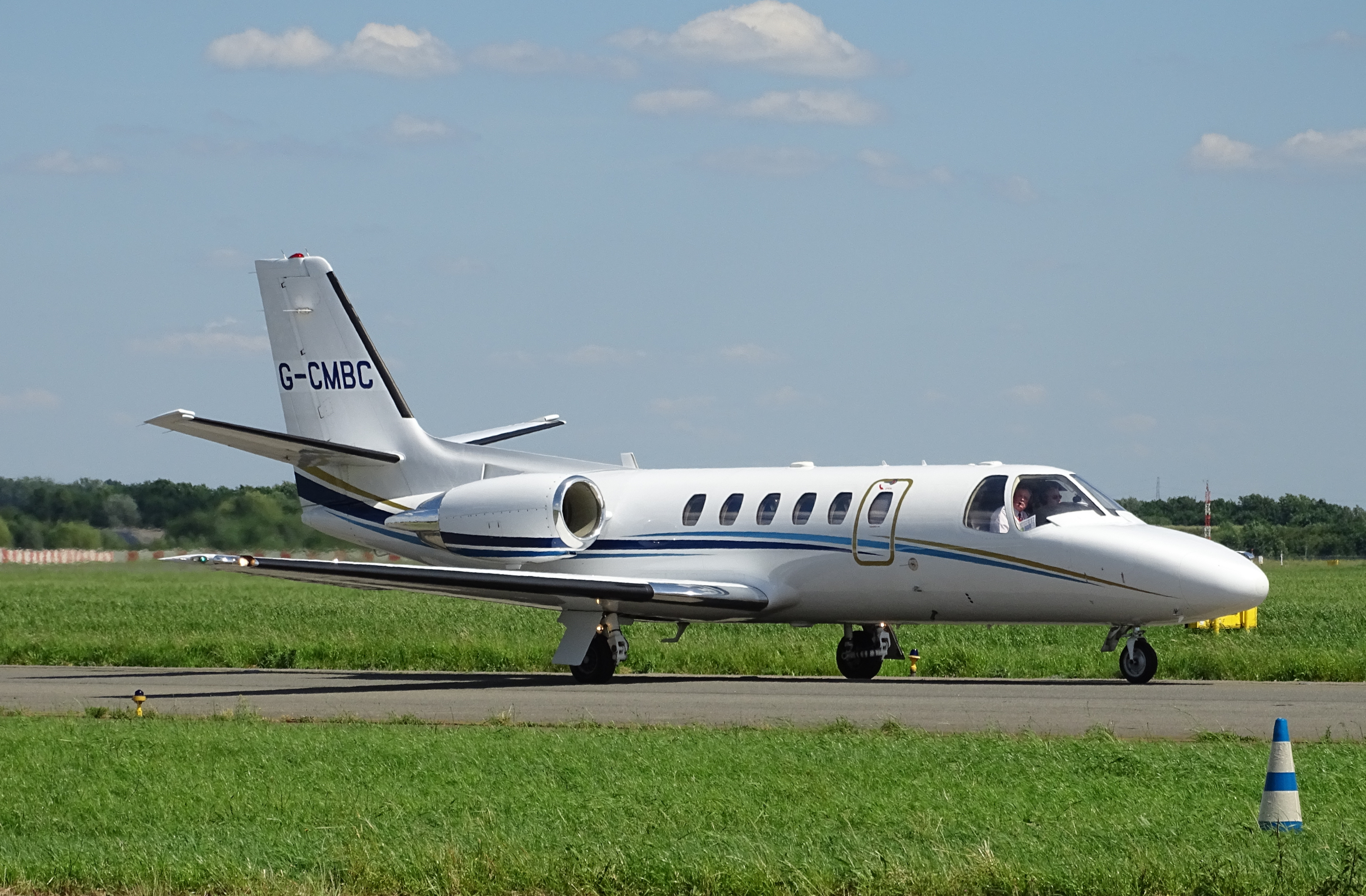 Cessna 550B Citation Bravo G-CMBC (Serial #: 550-0951) op de Internationale Luchthaven Antwerpen tijdens Stampe Fly In 2019.